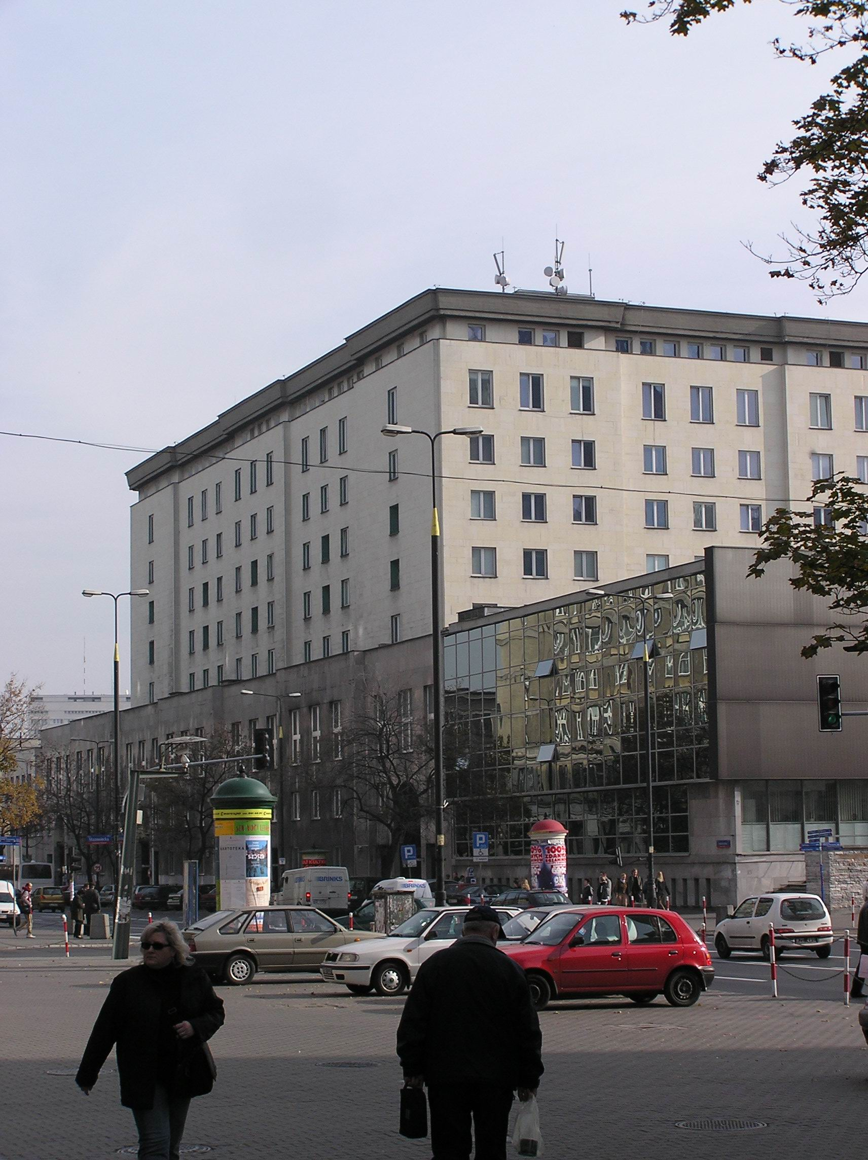 Budynek Narodowego Banku Polskiego w Warszawie na Świętokrzyskiej